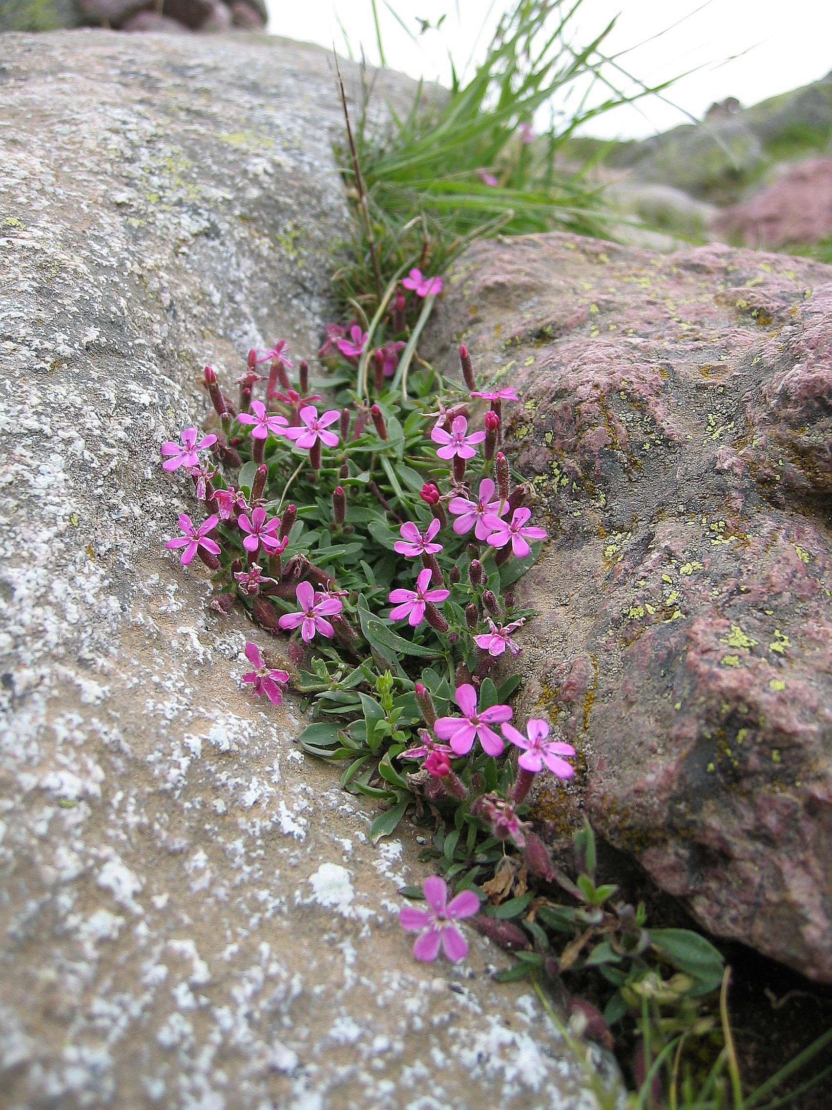 Saponaria ocymoides subsp. alsinoides, near Monte Cinto ~1600, Corse